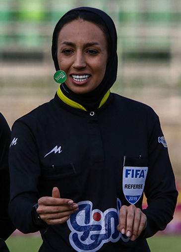 مهسا قربانی (داور)، دیدار تیم‌های ذوب آهن اصفهان و شهرداری بم در هفته بیستم و دوم لیگ برتر فوتبال بانوان باشگاه های ایران